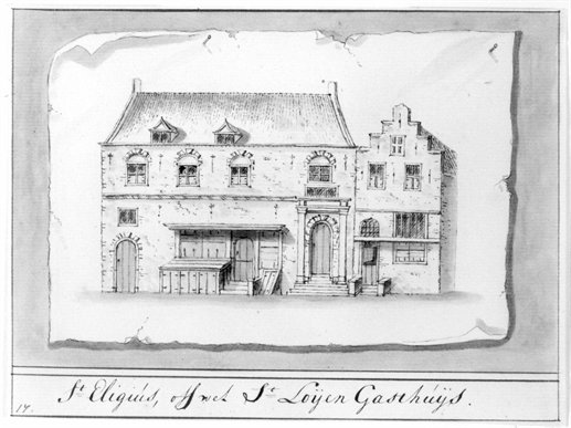 Utrecht: Sint Eloyen Gasthuis. St Eligius, offwel St Loijen Gasthuys